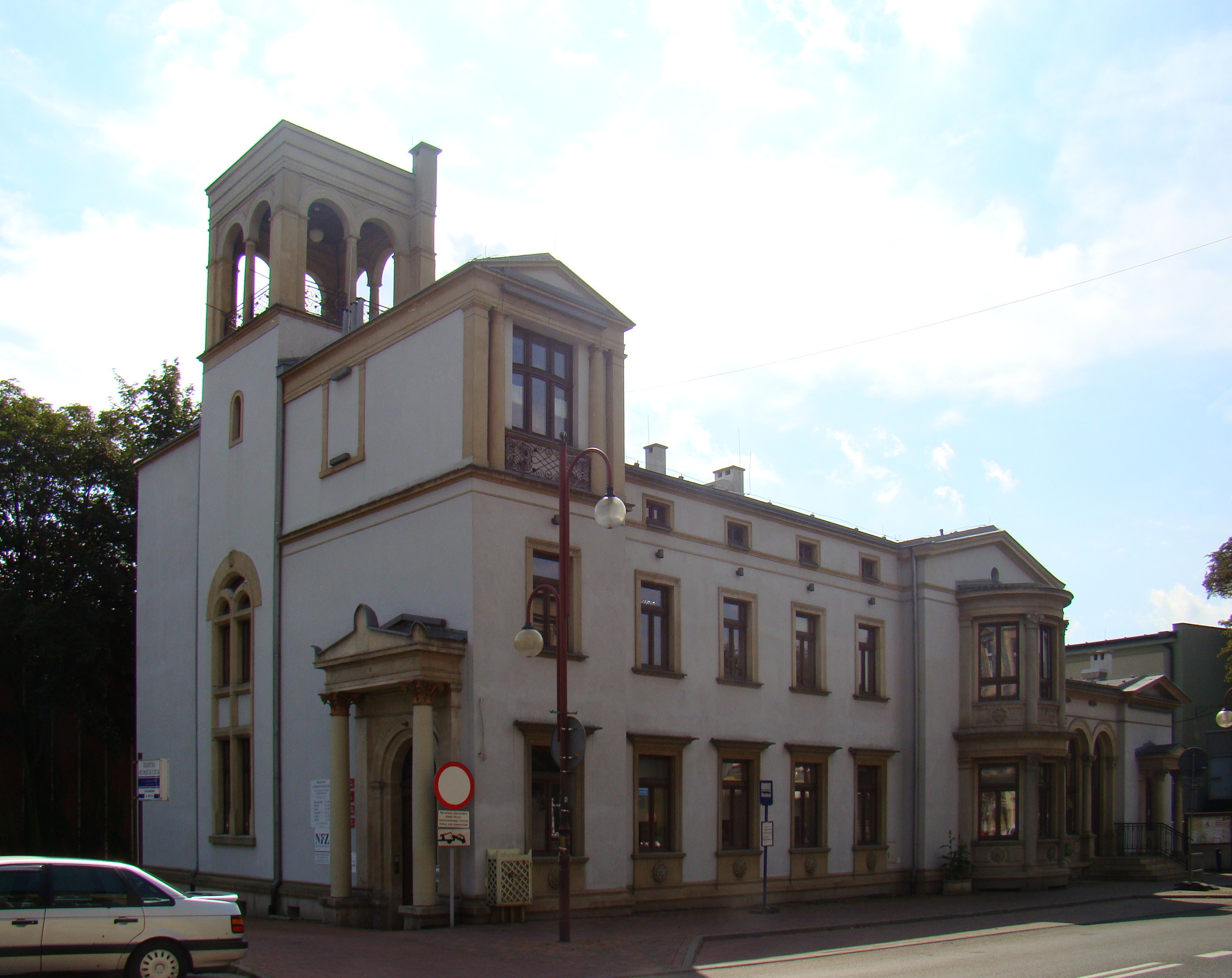 Siemianowice Śląskie, pałacyk Fitznera, 1870